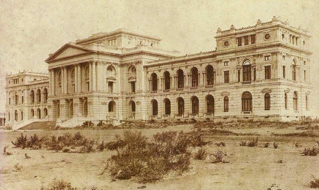 O Monumento da Independência, recém-construído, no final do século XIX. Foto do arquivo do Museu Paulista.